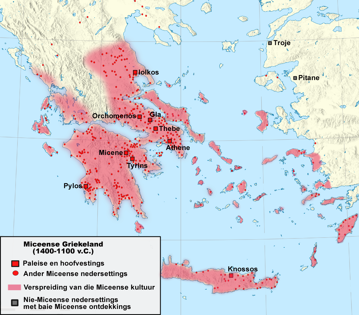 Miceense Griekeland